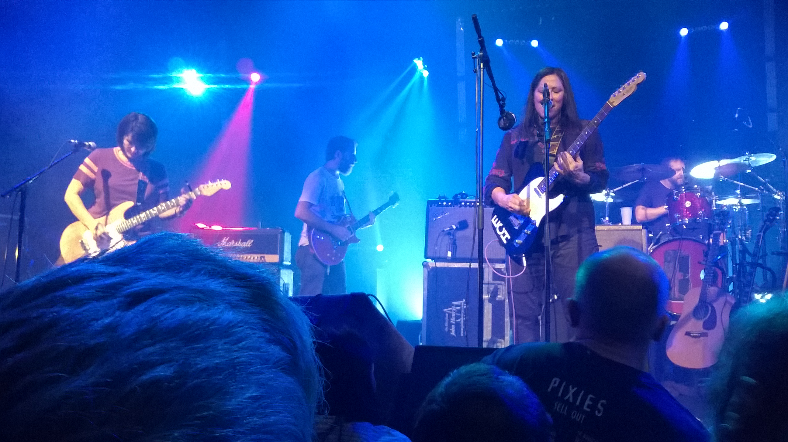 The Breeders, concert à la Gaîté Lyrique, Paris, France, 27 octobre 2017